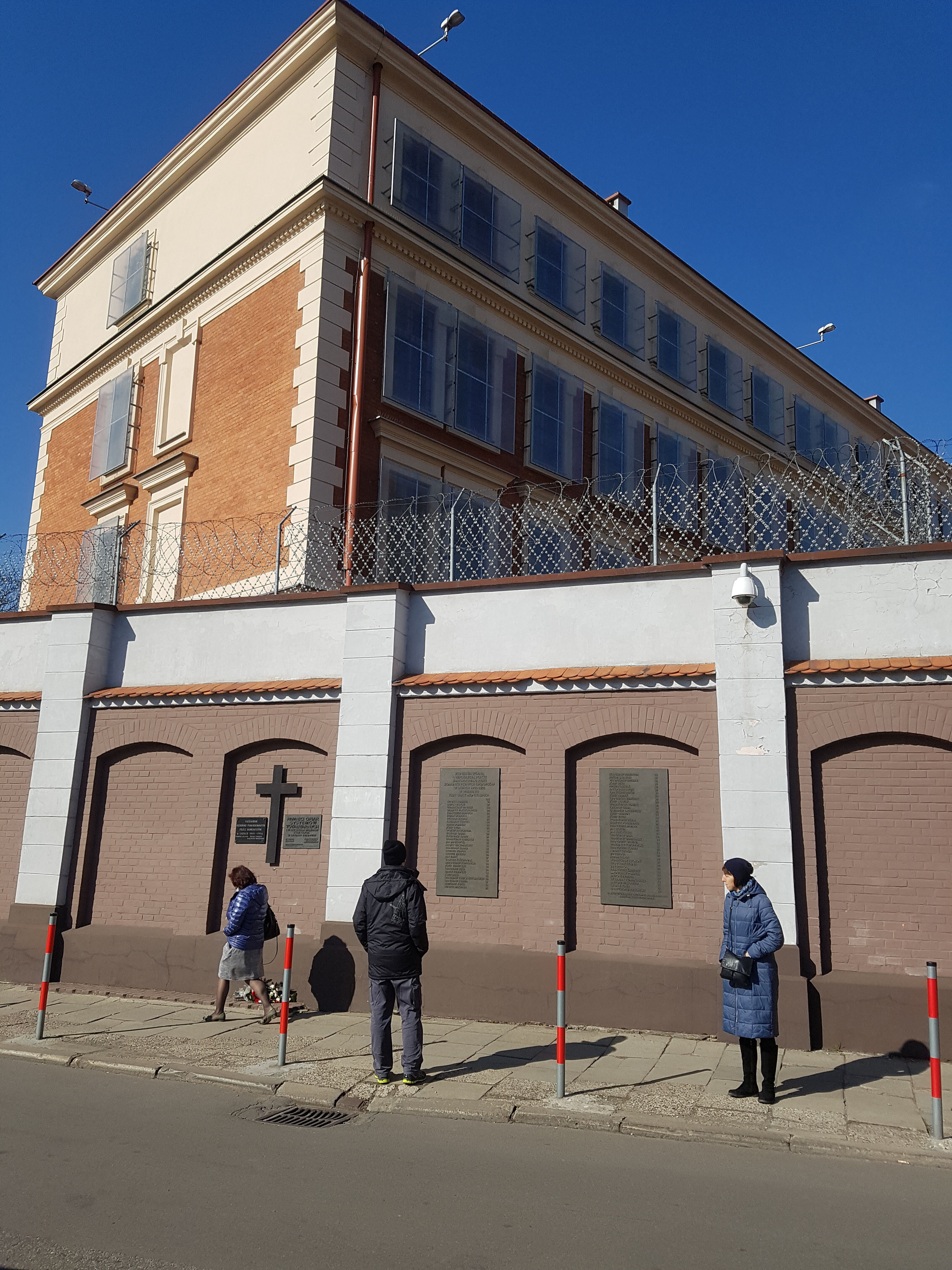 2019 האגף הצפוני של כלא מונטלופיך